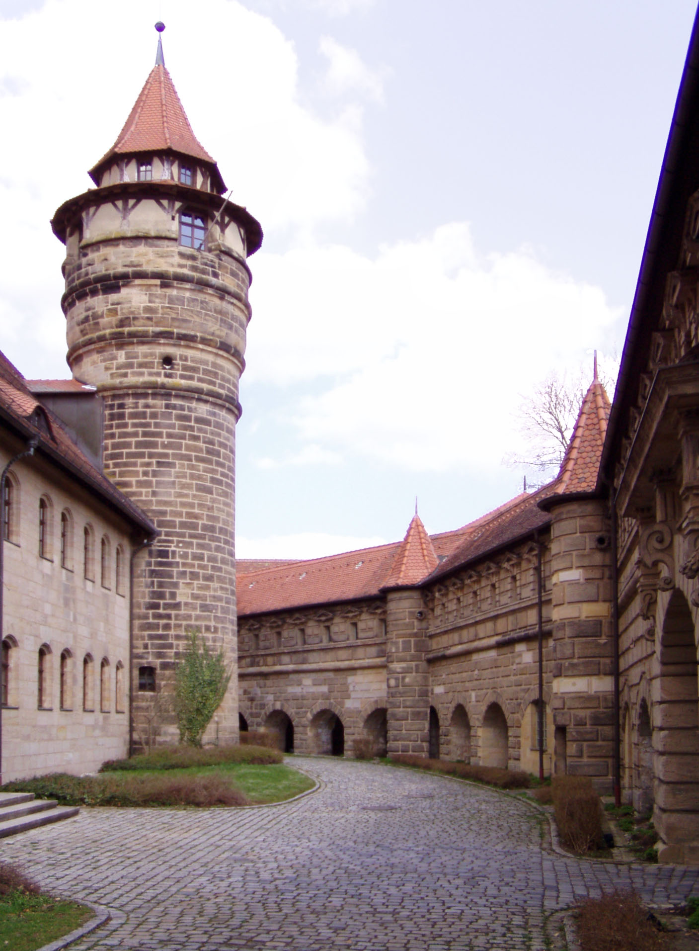 Innenhof der Festung in Lichtenau (MFR), Deutschland